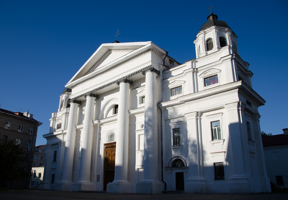 касцёл св.Станіслава (Унебаўзяцця Найсвяцейшай панны Марыі). г. Магілёў This is a photo of Belarusian heritage monument. Reference number: 513Г000020 ( WLM)